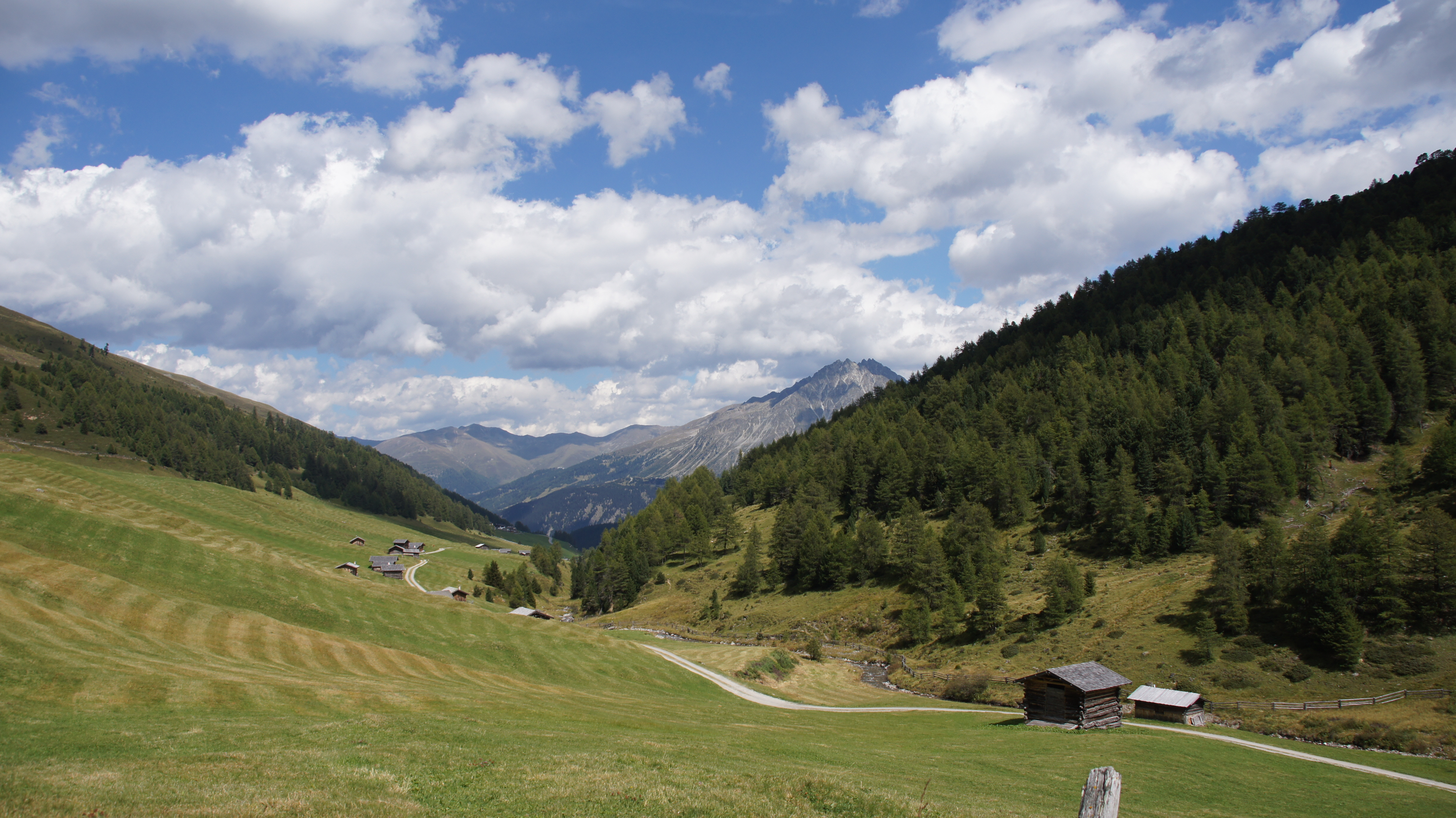 Rojental - Südtirol